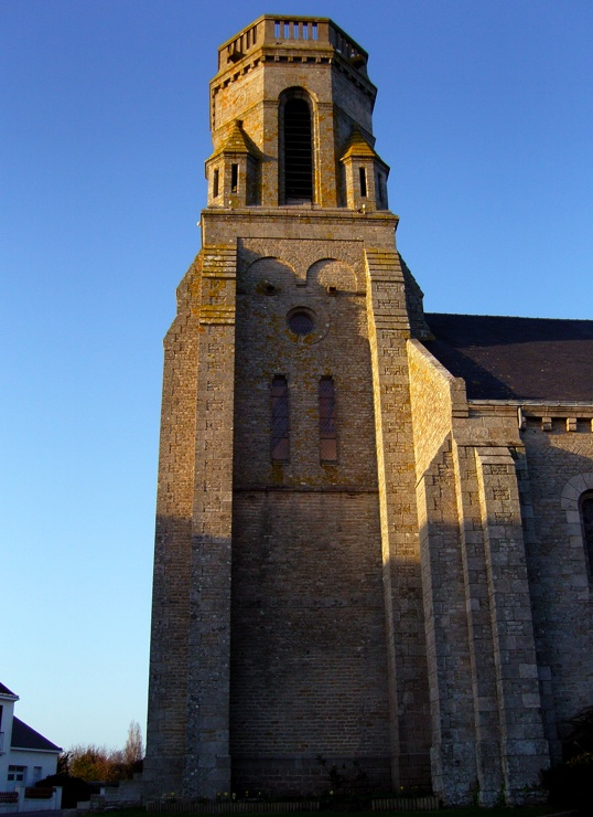 Église de Trescalan